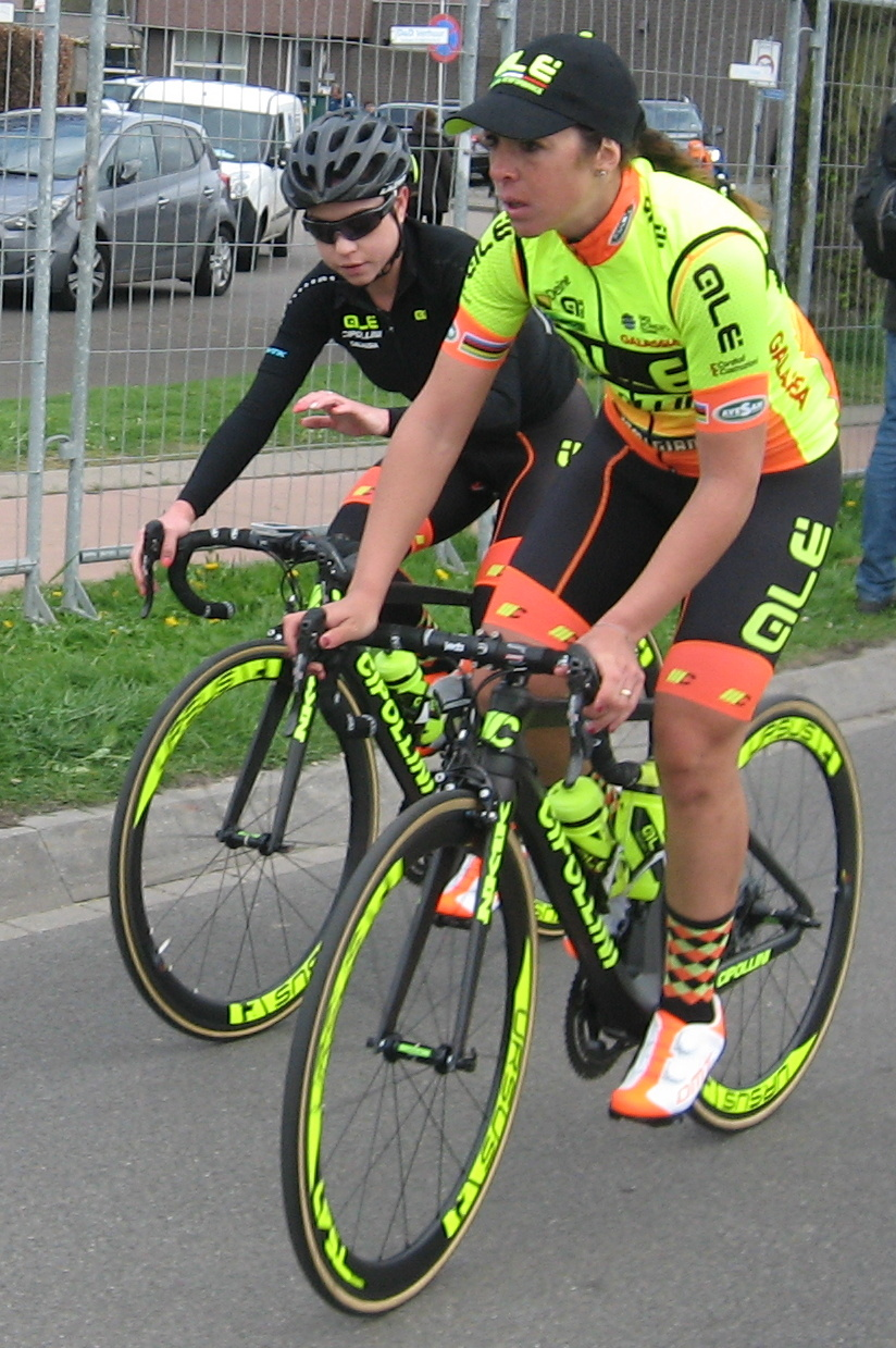 Na de finish van de Amstel Gold Race Ladies Edition 2017.